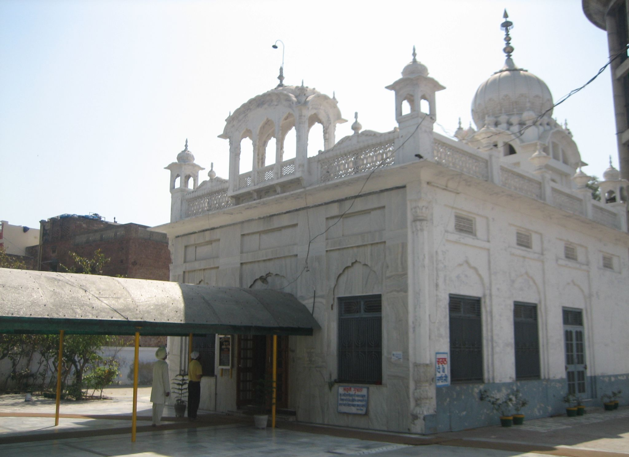 Gurudwara Shree Guru Ka Bagh